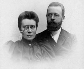 Paret Karl Wilhelm Hagelin och Hilda Hagelin (född Kinander)